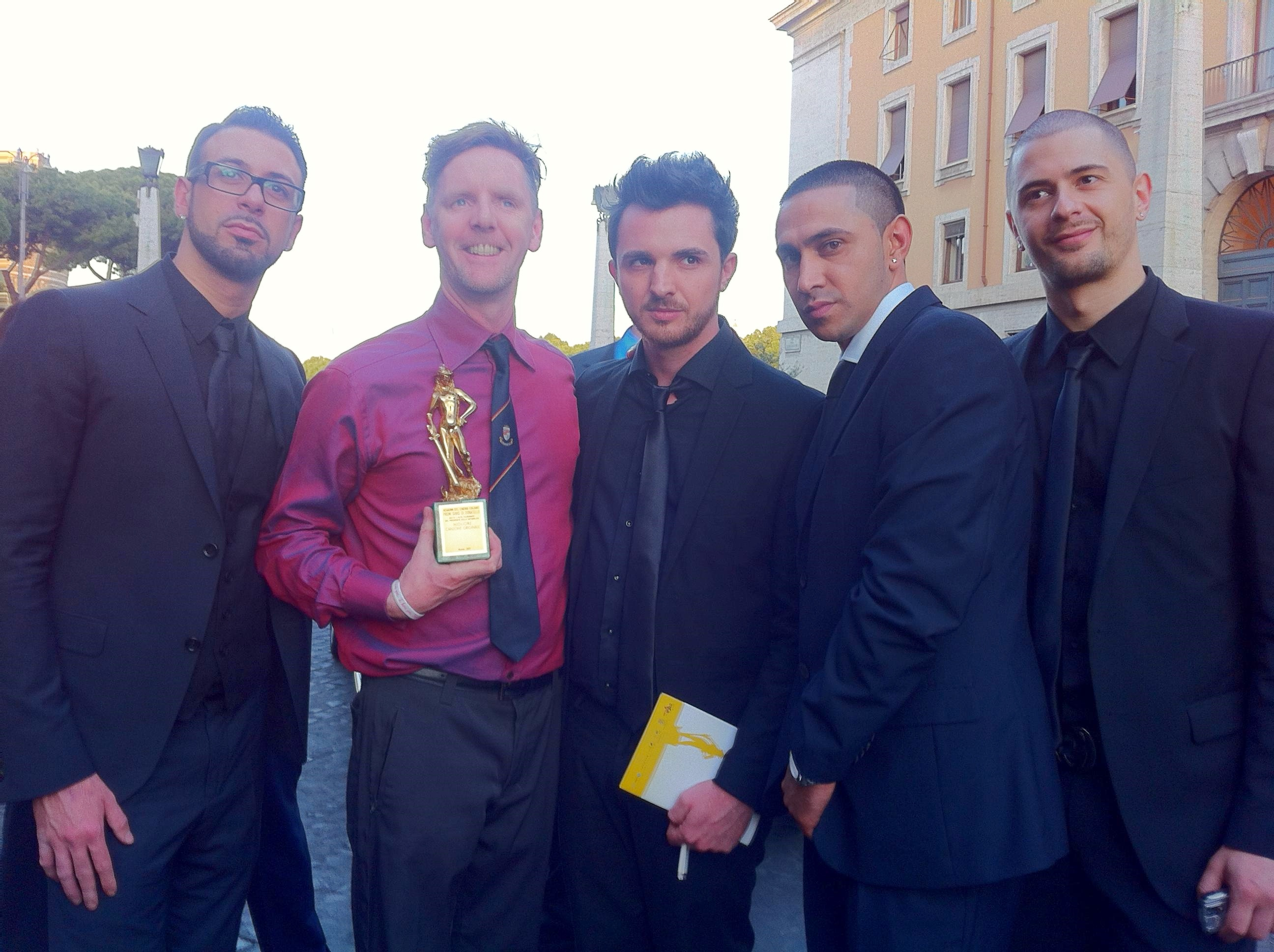 David di Donatello's winner Michael Brunnock together with Itaian music producers The Ceasars and the rapper Amir Issaa